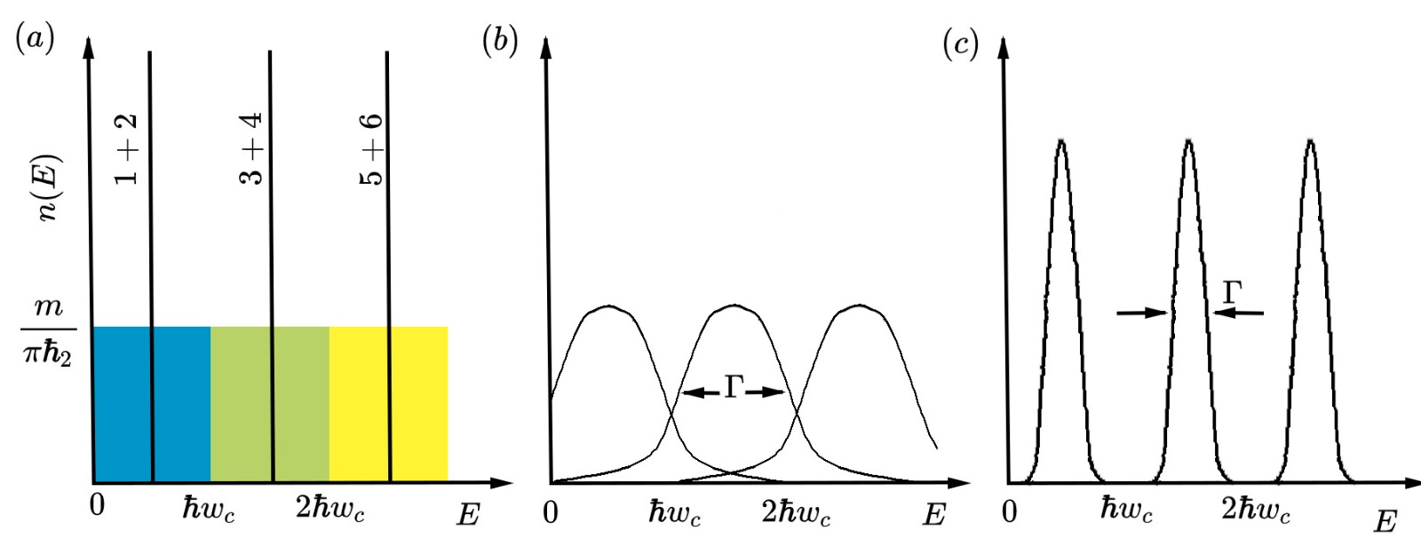 Gráfica de la densidad de estados sin considerar el spin splitting